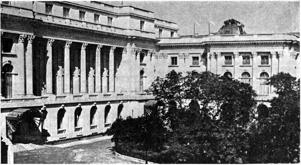 Palatul Regal din București